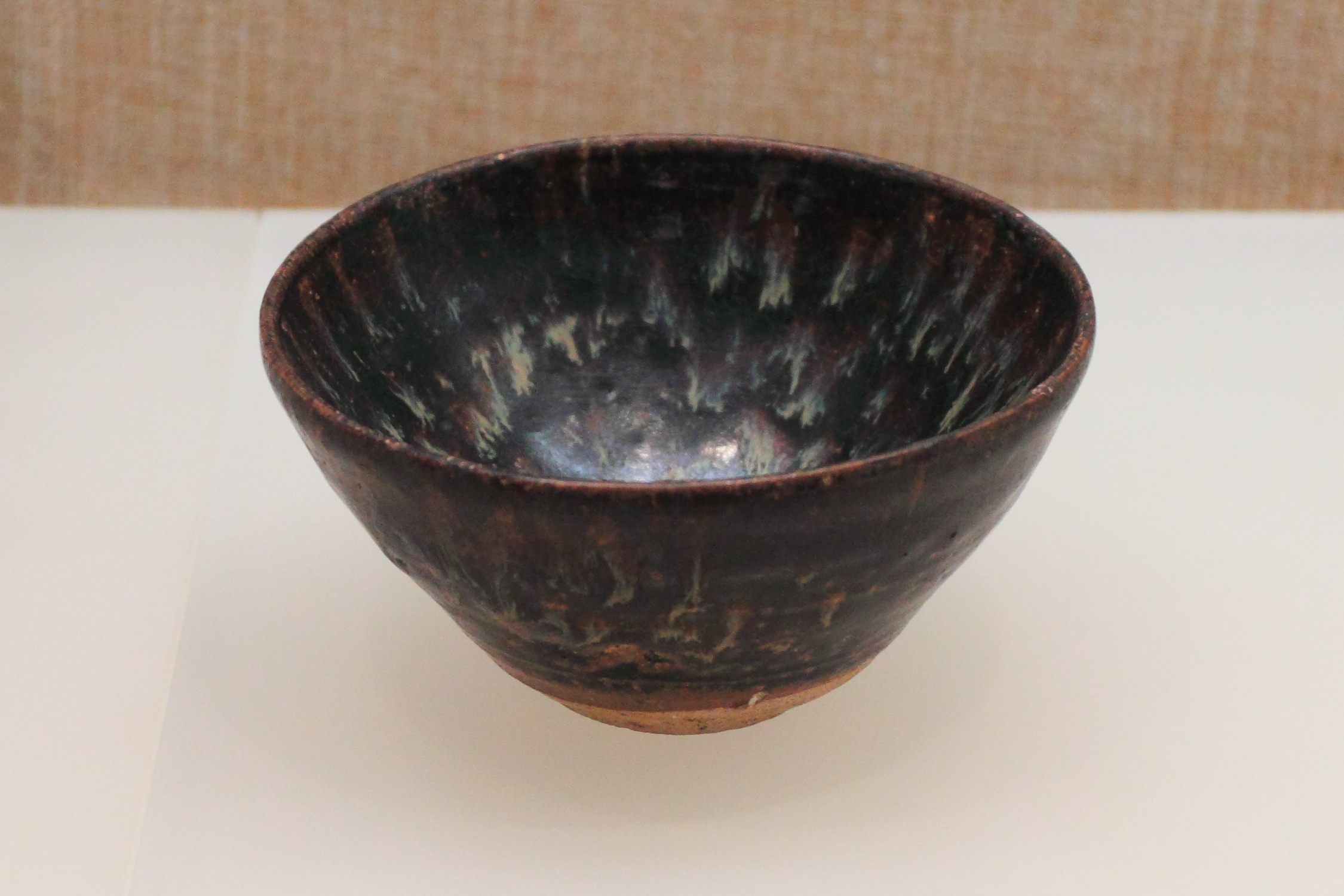 广东省博物馆 ——“土火之艺”（馆藏历代陶瓷展览）—— 吉州窑玳瑁纹小碗